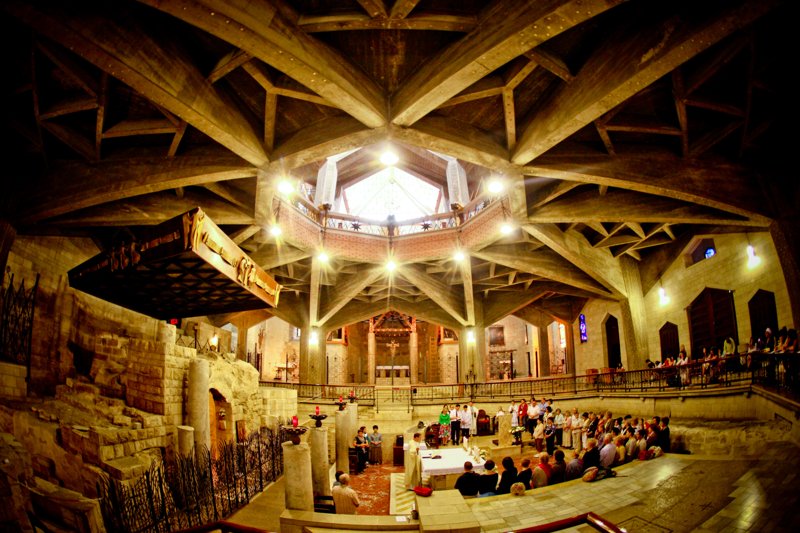 כנסיית הבשורה נצרת